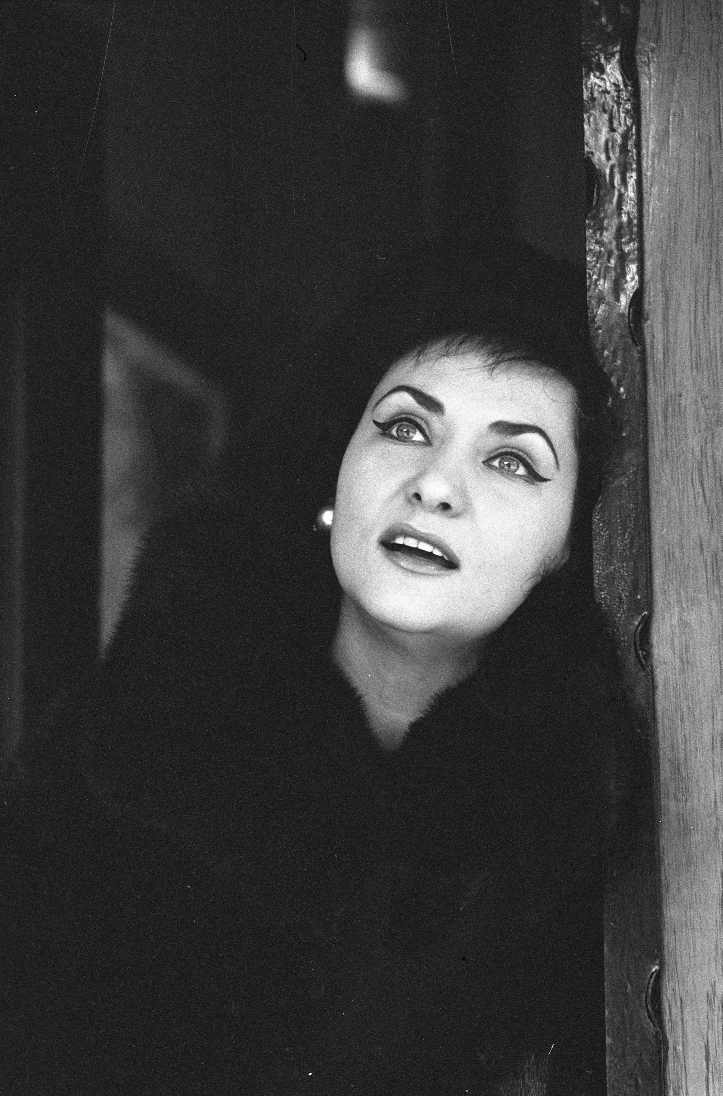 Collectie / Archief : Fotocollectie Anefo Reportage / Serie : [ onbekend ] Beschrijving : Donizettis Lucia uit Italie, Virginia Zeani (kop) Datum : 17 januari 1963 Locatie : Italië Trefwoorden : sopranen Fotograaf : Broers, F.N. / Anefo Auteursrechthebbende : Nationaal Archief Materiaalsoort : Negatief (zwart/wit) Nummer archiefinventaris : bekijk toegang 2.24.01.05 Bestanddeelnummer : 914-7221